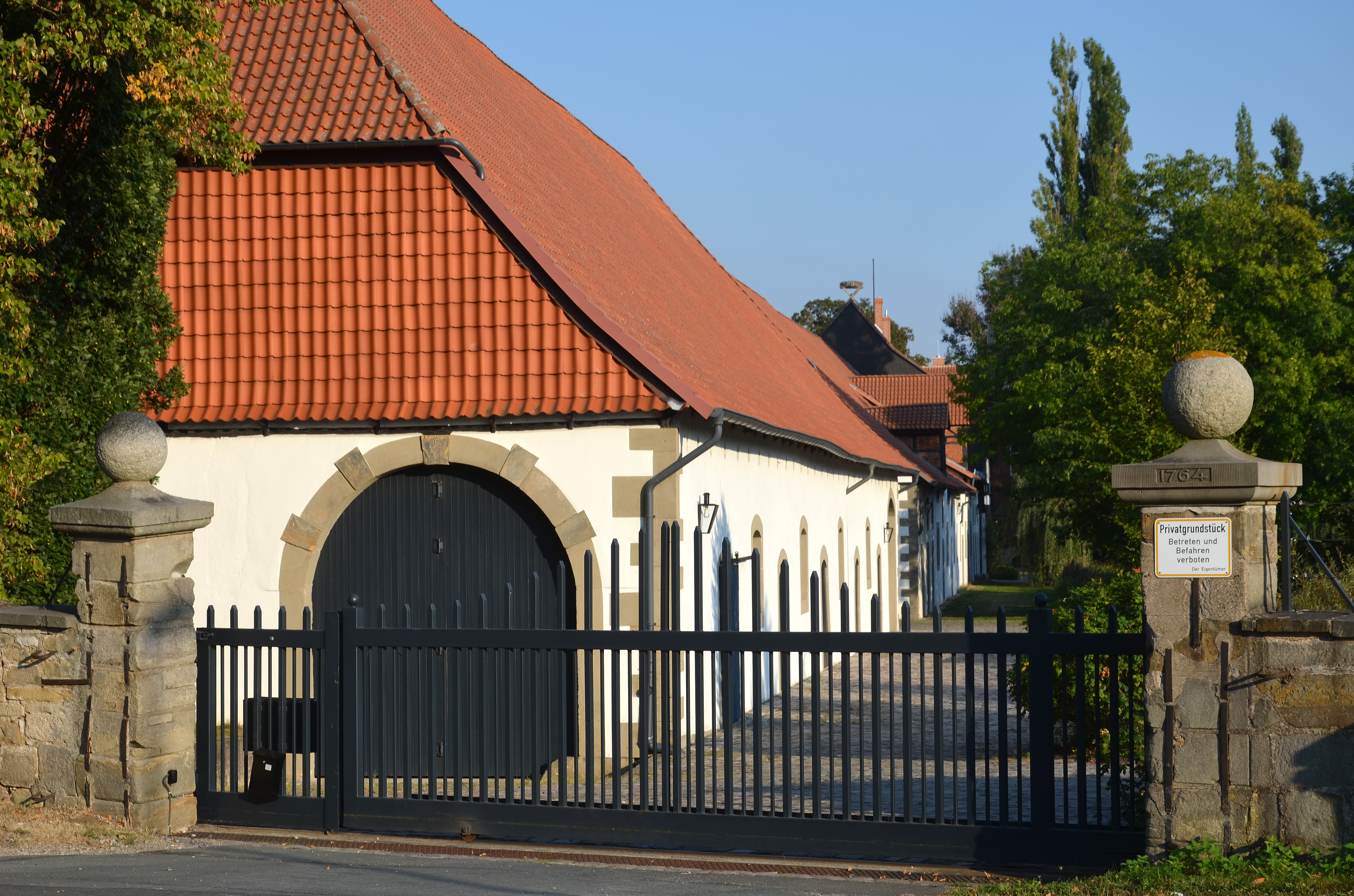 1764 datierte Gutshof-Einfahrt zur Domäne Calenberg in Schulenburg an der Hauptstraße des Ortes ...